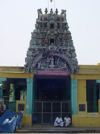 காரைக்கால் நகரில் அமைந்திருக்கும் காரைக்கால் அம்மையார் திருக்கோயில்.